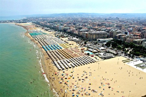 Idealna staza je pescana plaza